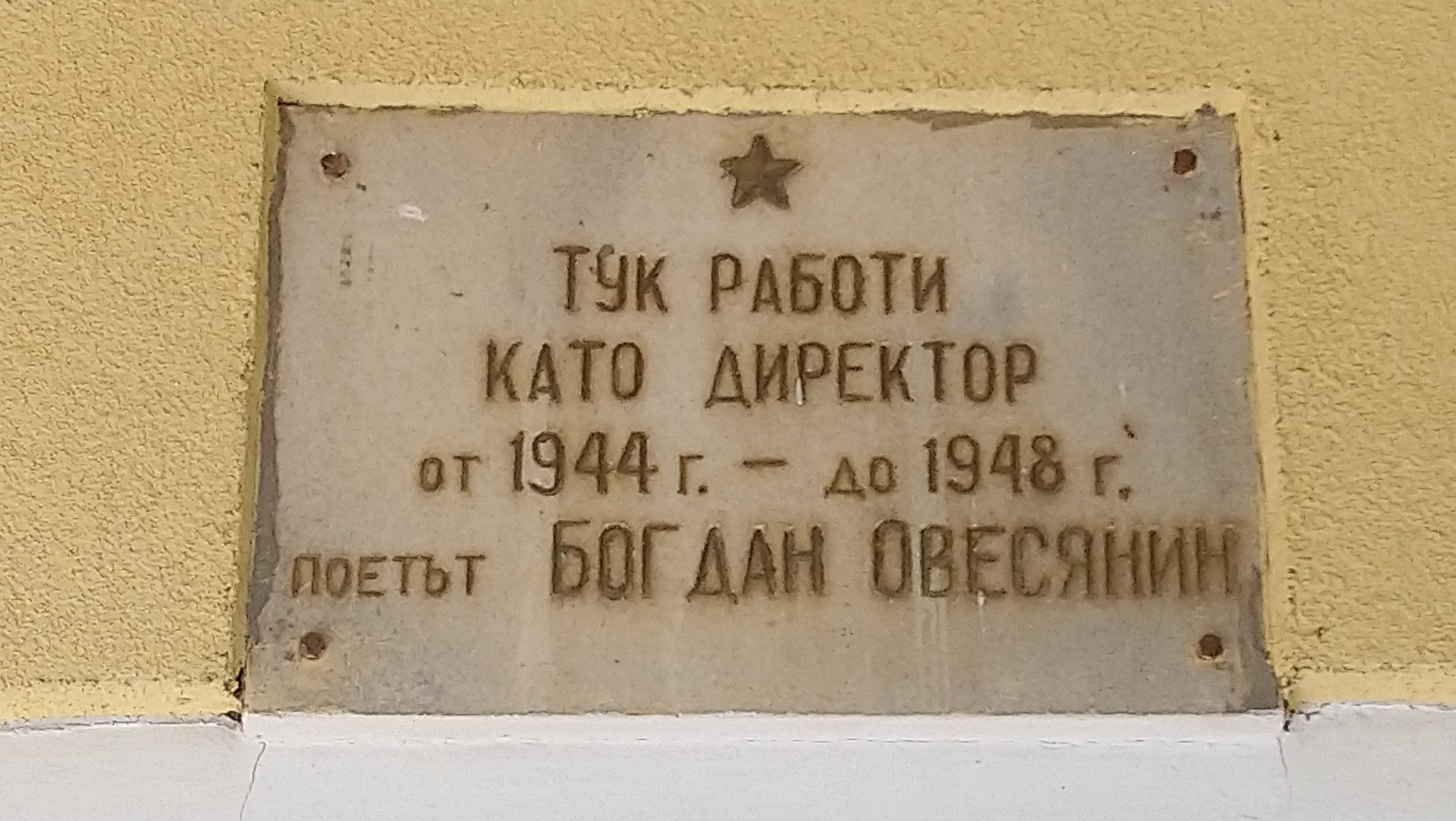 Старата паметна плоча на поета Богдан Овесянин, Стрелча